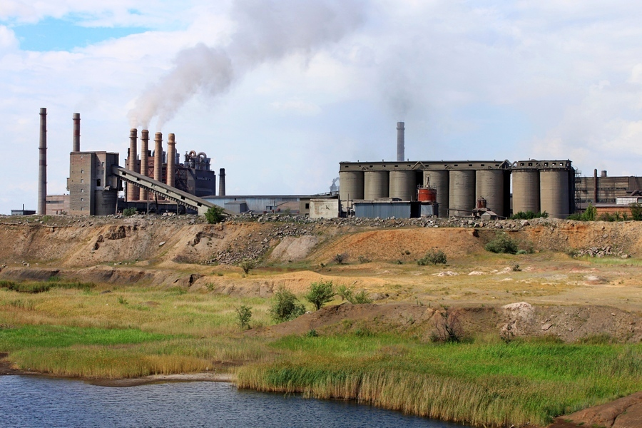 Карагандинский цементный завод в поселке Актау